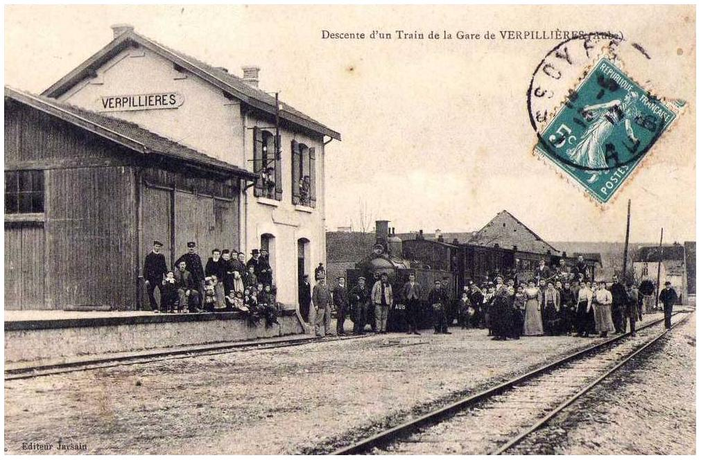 Gare des chemins de fer départementaux à Verpillières-sur-Ource.